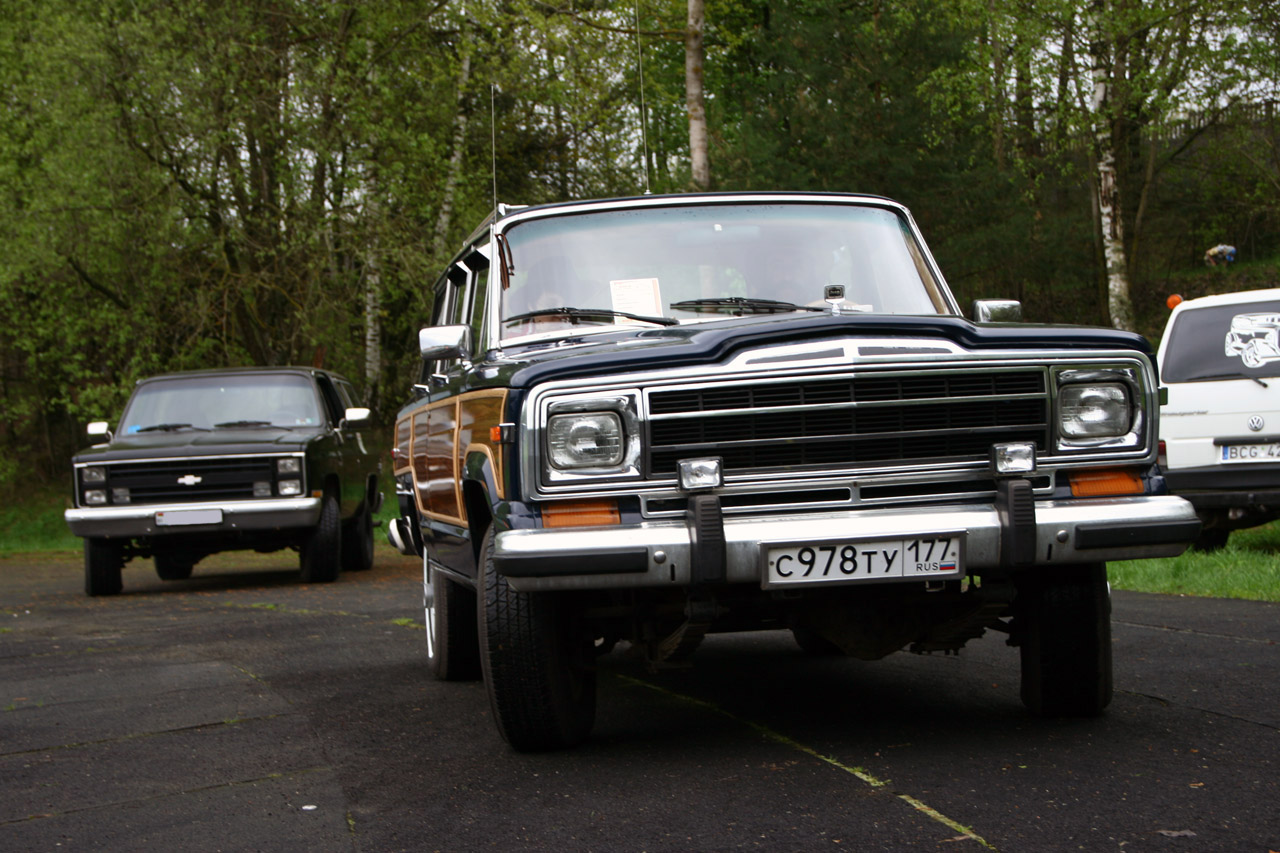 Jeep Wagoneer на слете Ретро-Минск 2012